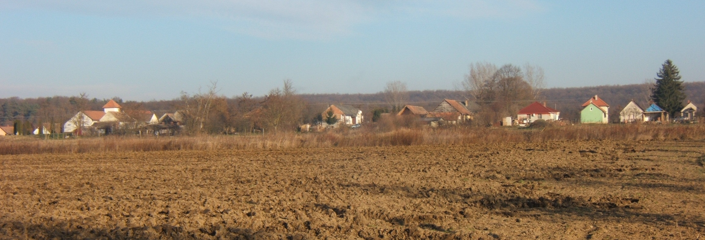 Somodor látképe